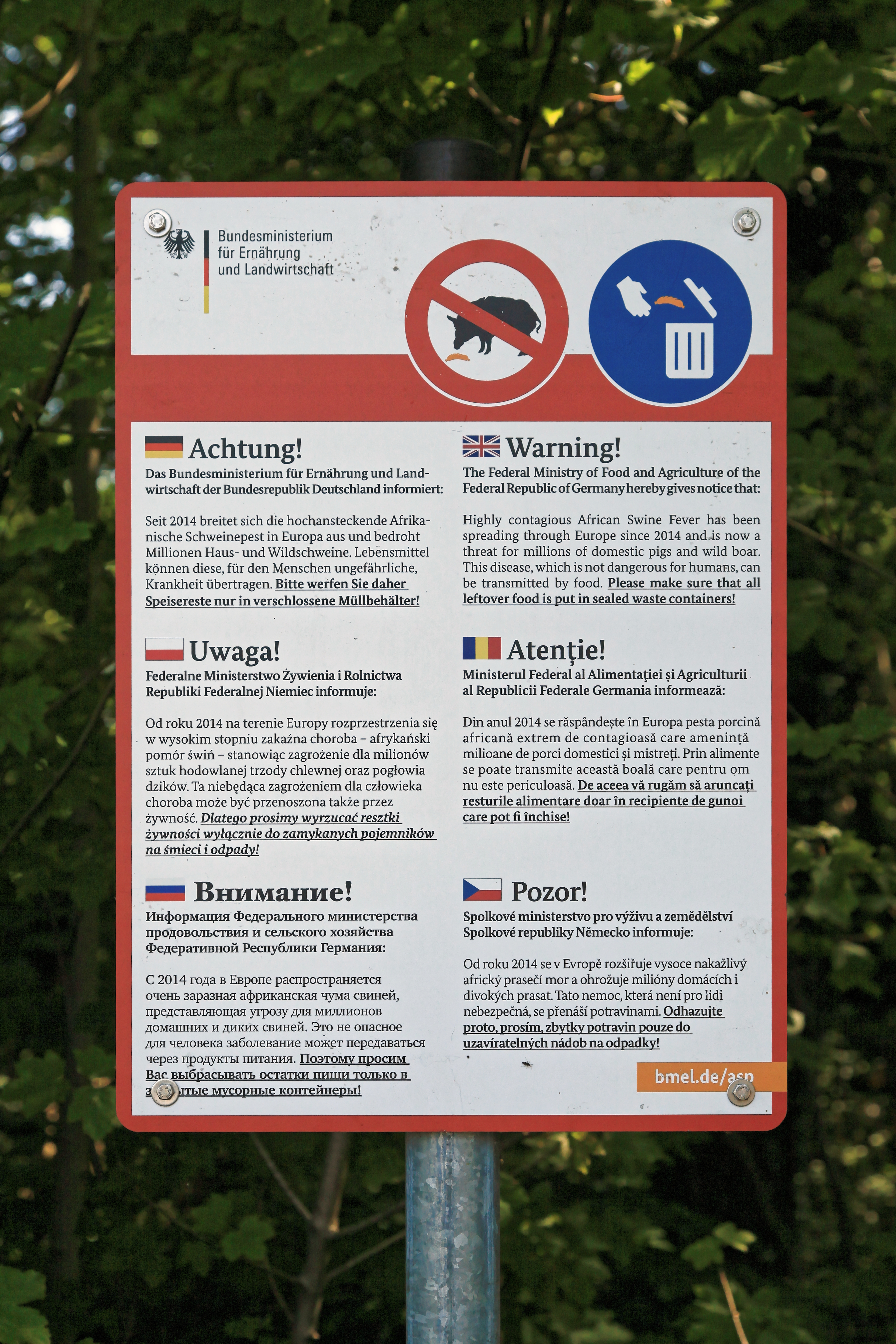 Parkplatz der Begräbnisstätte Esterwegen, Bundesstraße 401 in Esterwegen